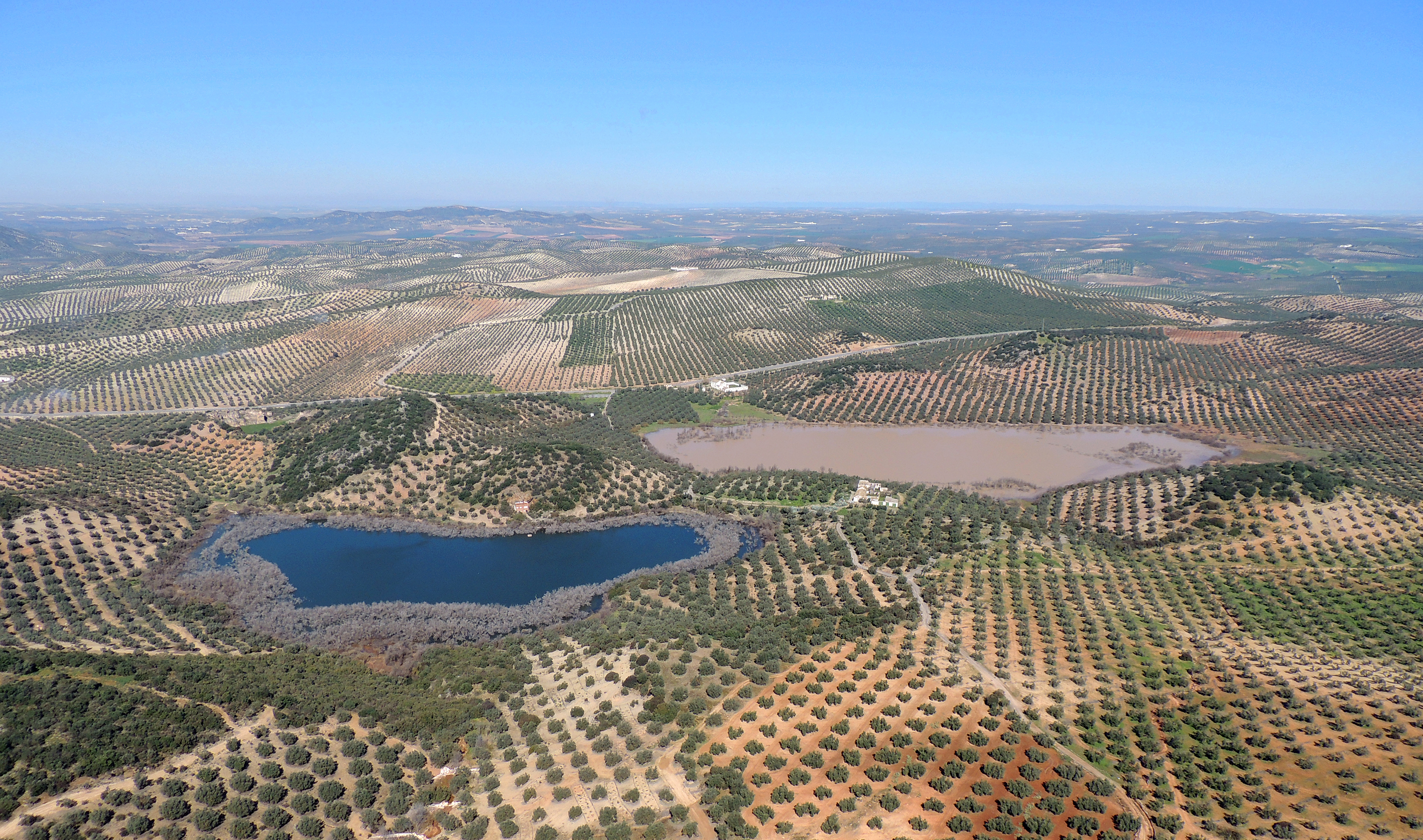 Lagunas Amarga (izquierda) y Dulce (derecha)